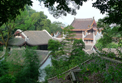 长沙岳麓书院